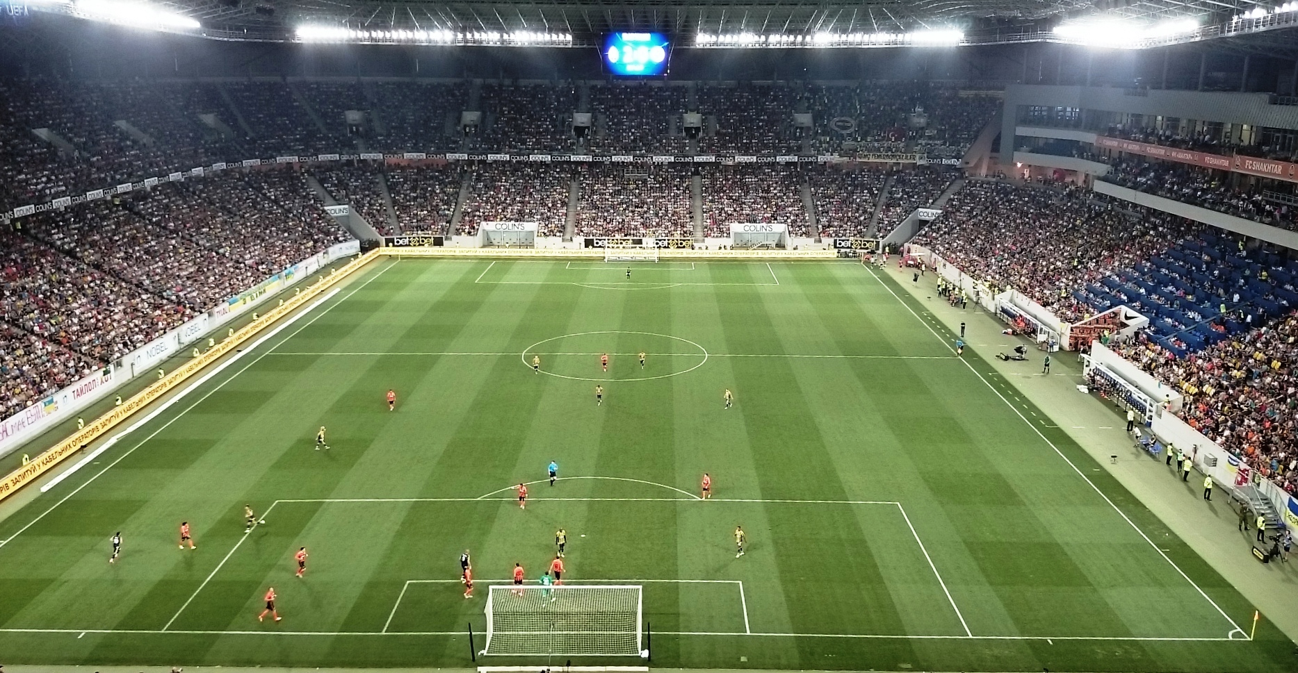 Поле стадіону Арена Львів під час матчу Шахтар – Фенербахче